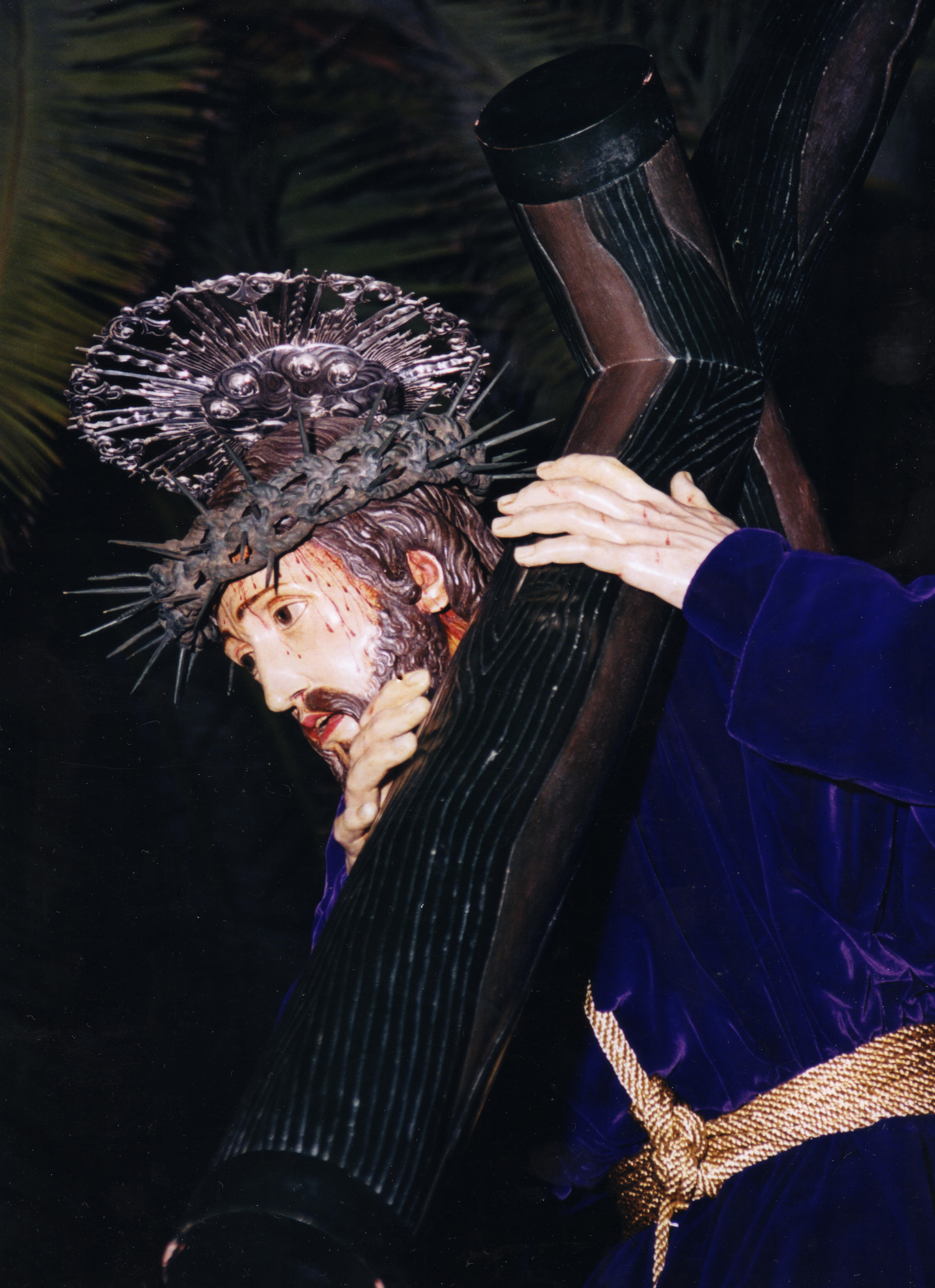 Nazareno de la Parroquia Matriz del Apóstol Santiago de Los Realejos